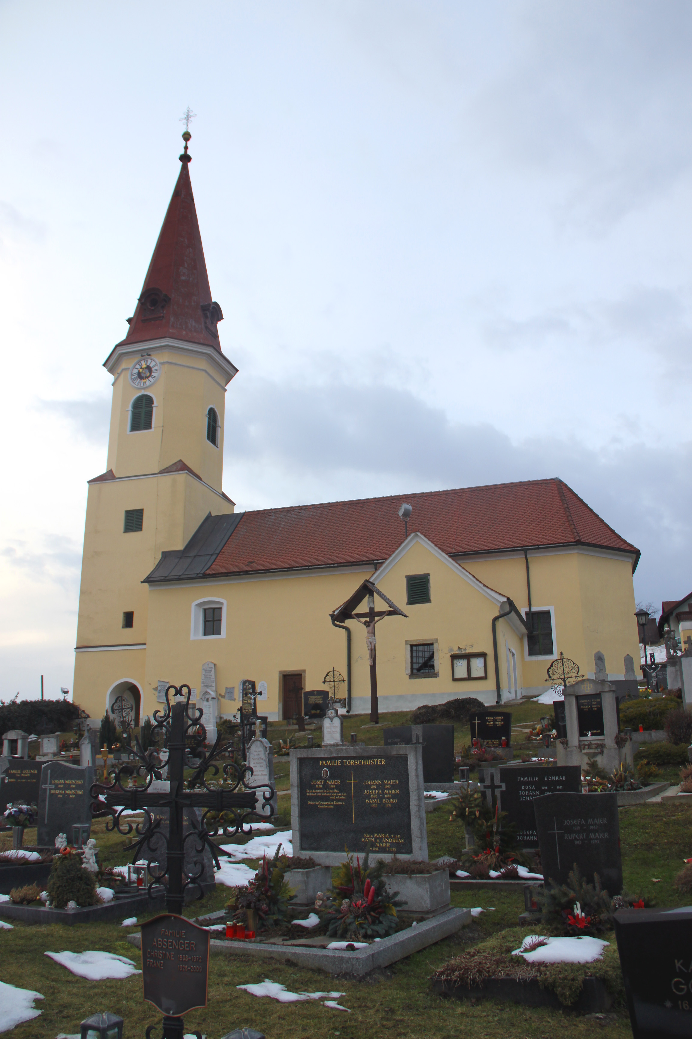 Filialkirche St. Ulrich am Waasen und Friedhof